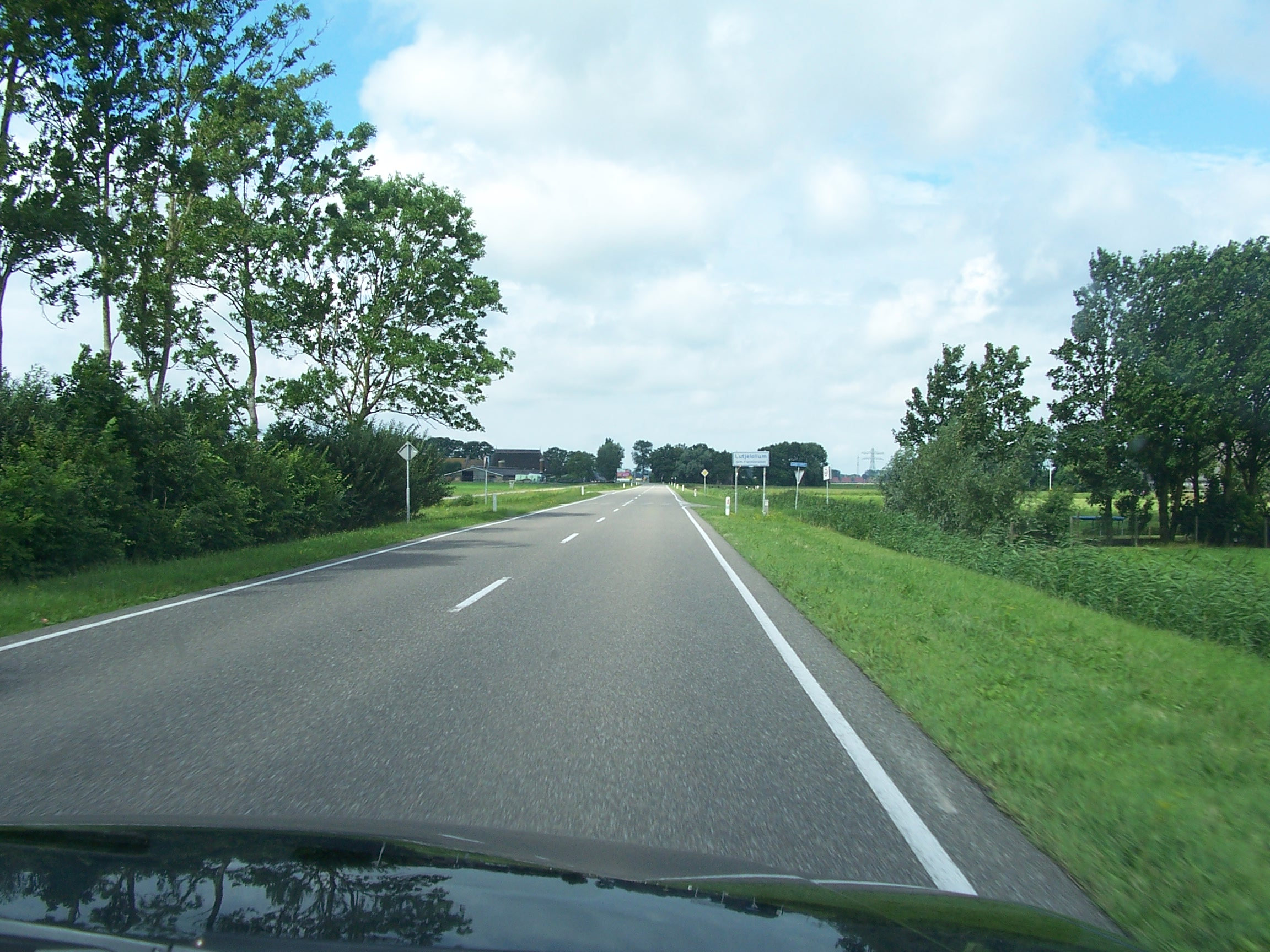 N384 - Lutje Lollemweg